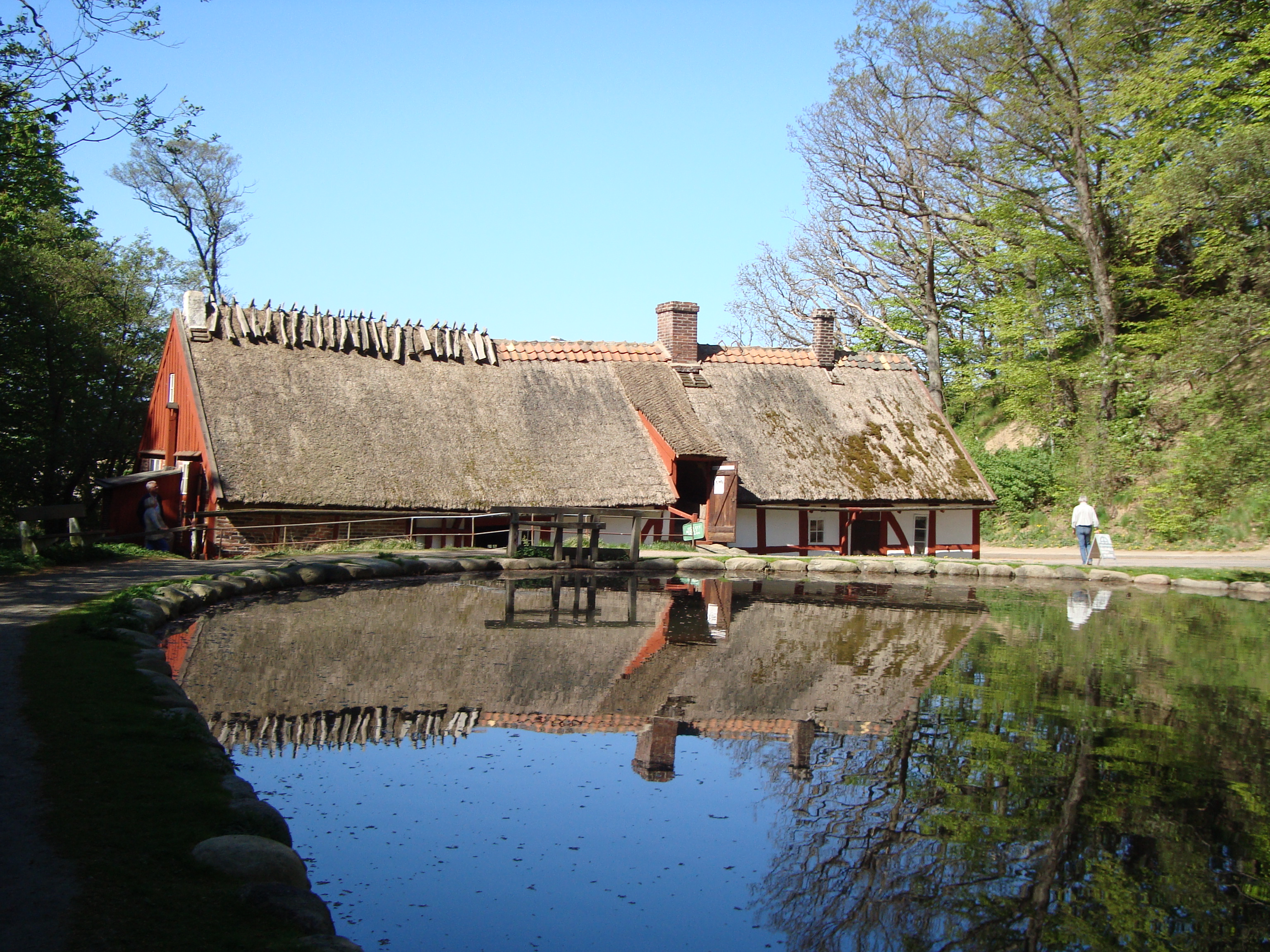 Pålsjö mölla vid Pålsjö skog i Helsingborg.